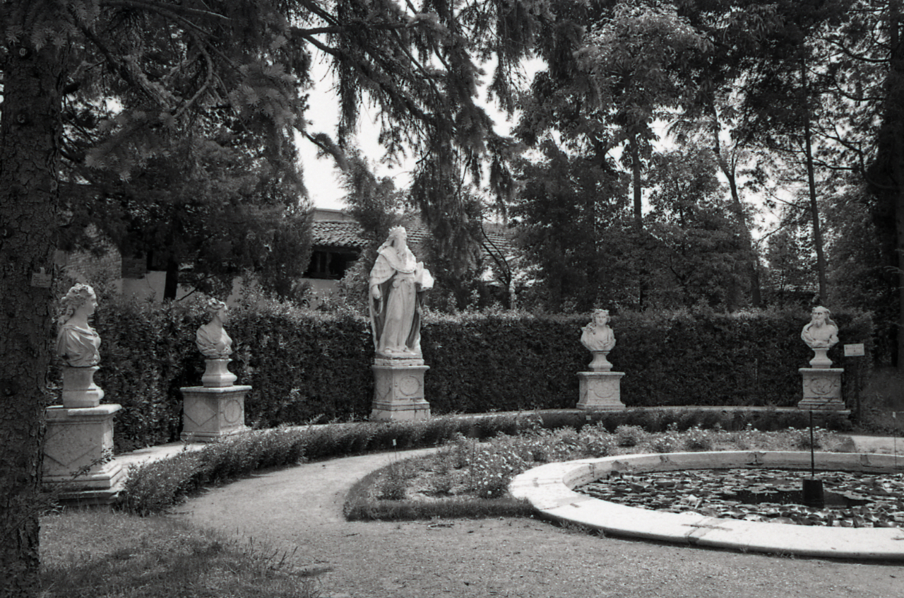 Servizio fotografico : Padova, 1967 / Paolo Monti. - Strisce: 3, Fotogrammi complessivi: 13 : Negativo b/n, gelatina bromuro d'argento/ pellicola ; 35 mm. - ((I fotogrammi hanno una doppia numerazione. . - Sul portanegativi: Leica M Adox 21. - Occasione: Pubblicazione: Diego VALERI (a cura di), Padova: i secoli, le ore, Bologna, Edizioni Alfa, 1967. - Fonte: Agenda di Paolo Monti: Monti/ 3 aprile 1966 - 9 marzo 1971/ 12421-16823 (1966-1971), presso Archivio Paolo Monti